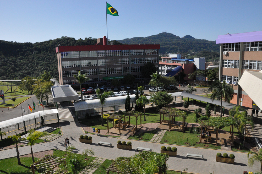 Campus II da Universidade Feevale, frente do prédio lilás.